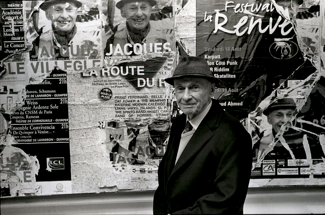 Jacques Villeglé à la Galerie G.-Ph. & N. Vallois à Paris.